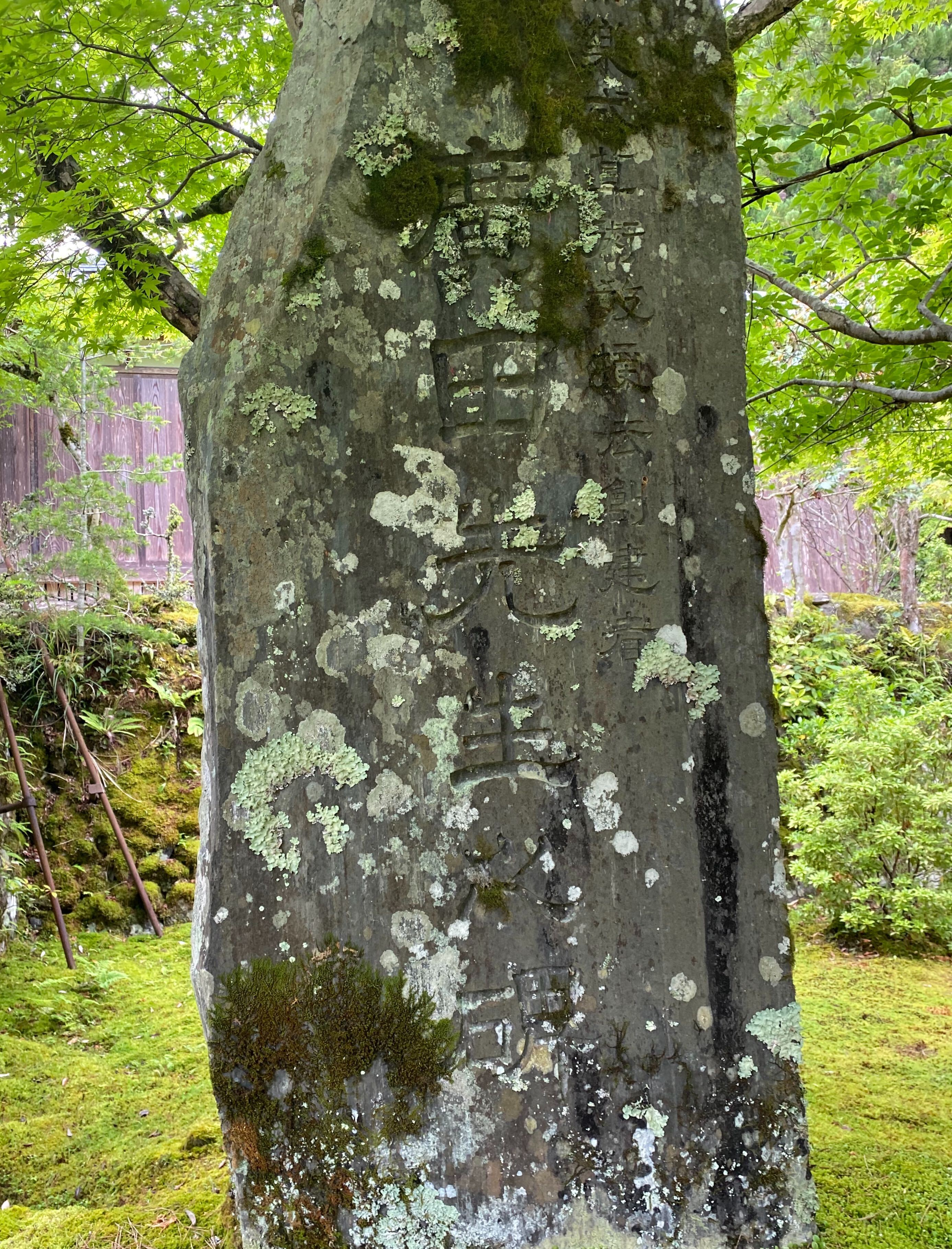 神護寺にある廣田虎之助の碑。1918年建立。